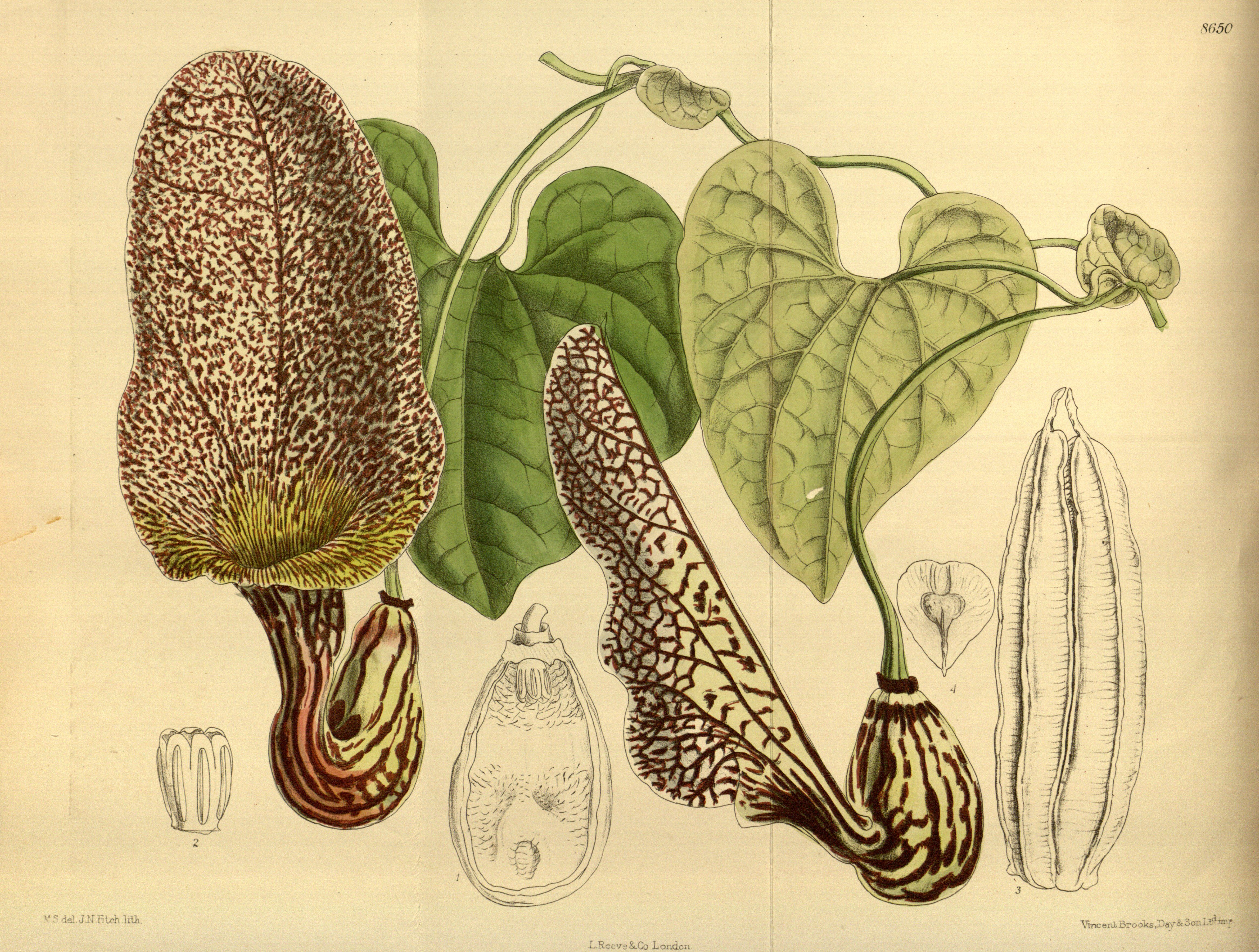 Aristolochia lawrenceae, Aristolochiaceae